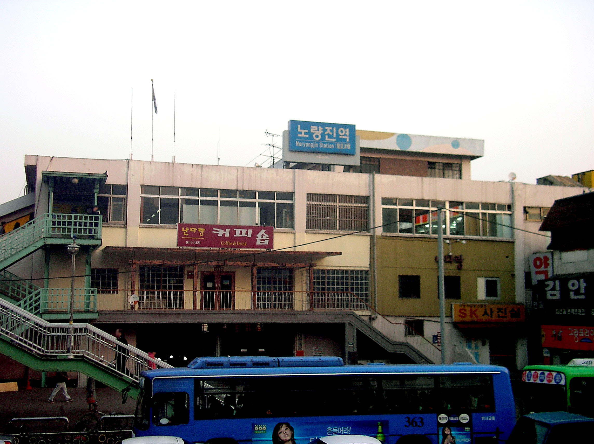 Noryangjin Station (ko en ja)